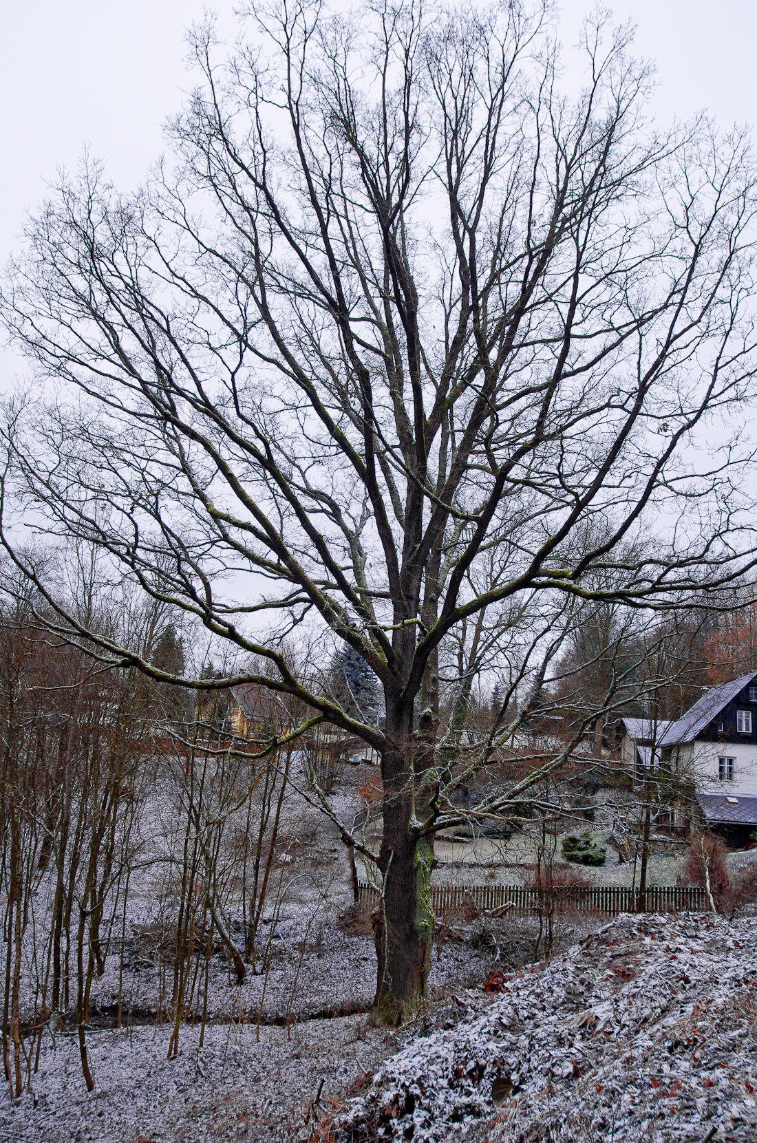 památný strom - Dub v Loučné u Jinřichovic, Krušné hory, okres Sokolov